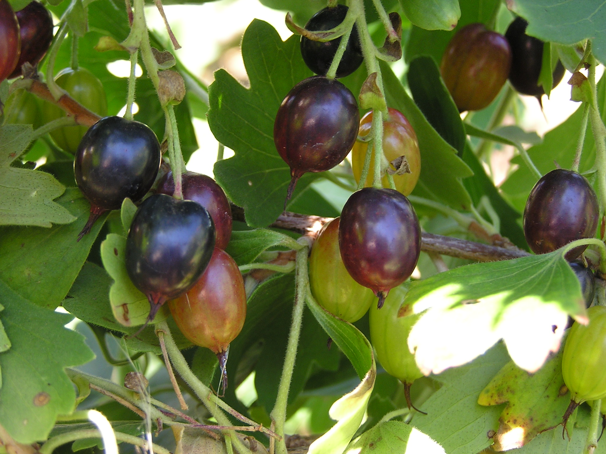 Растение